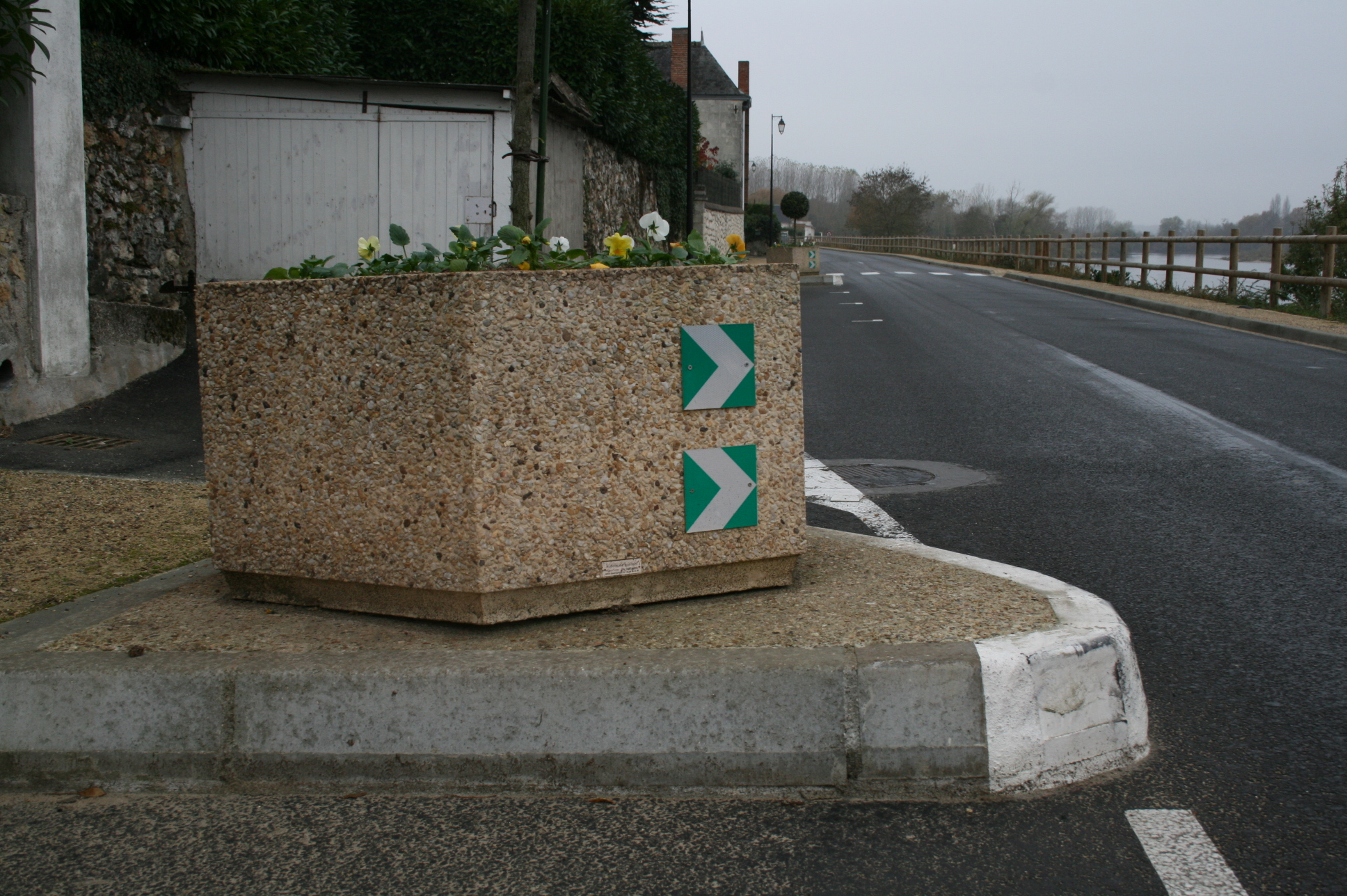 Micor balises J4 à fond vert, non réglementaires (France)